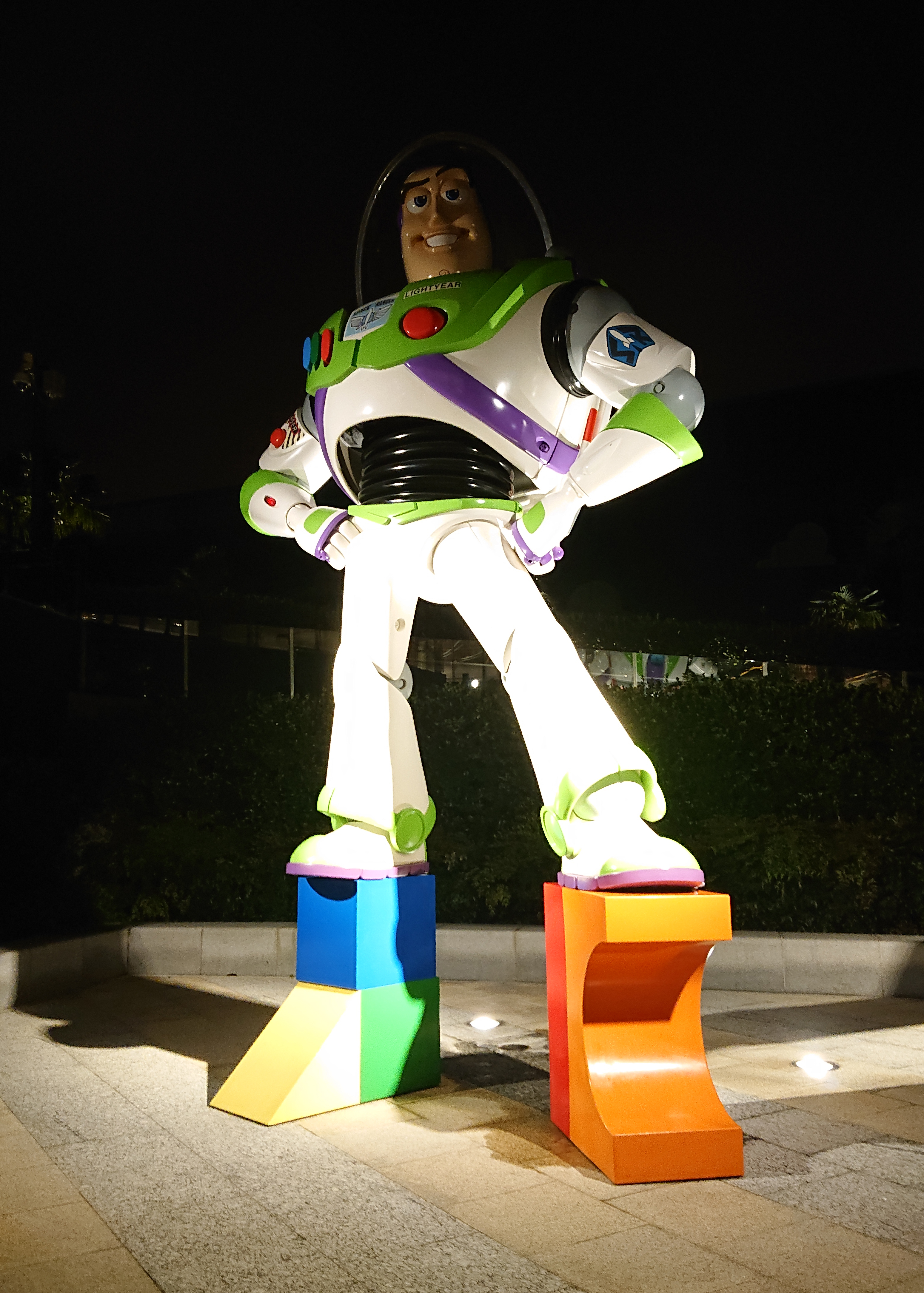 上海迪士尼度假區玩具總動員酒店內的巴斯光年雕像